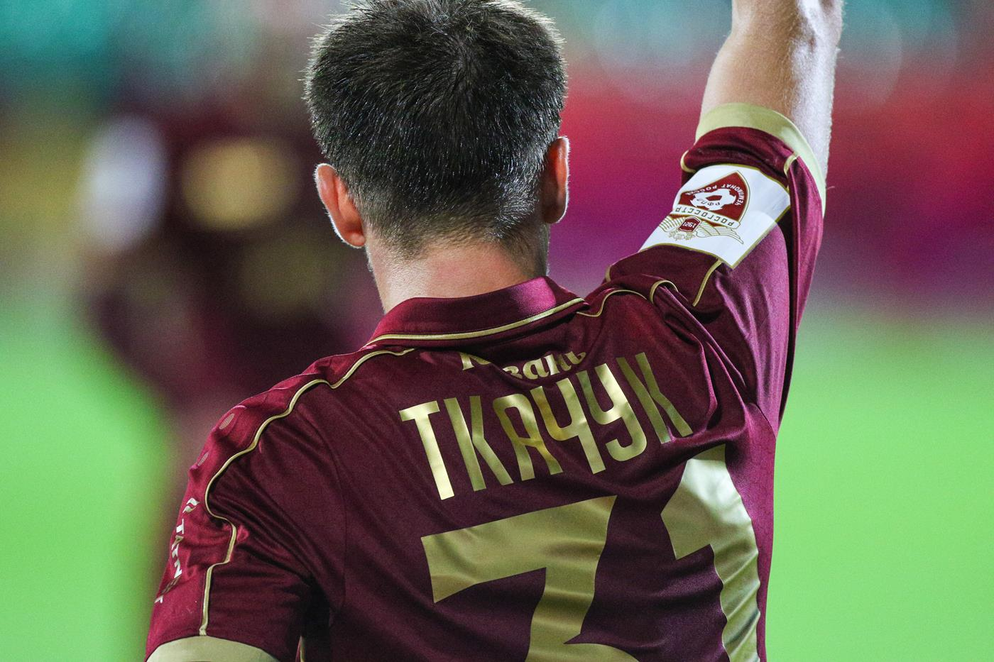 Денис Ткачук в матче "Рубин" - "Урал" 12.09.2016